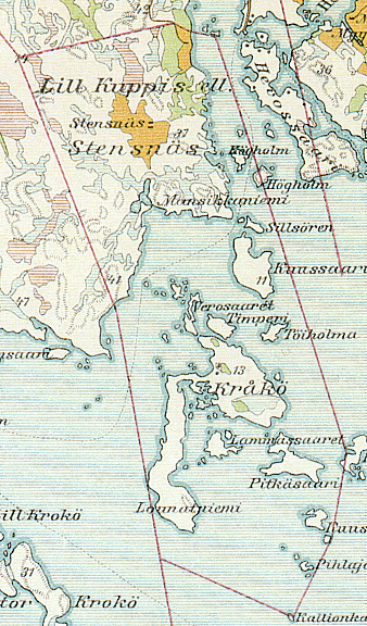 Karta över Stensnäs, Pyttis 1914 (Pyhtää)